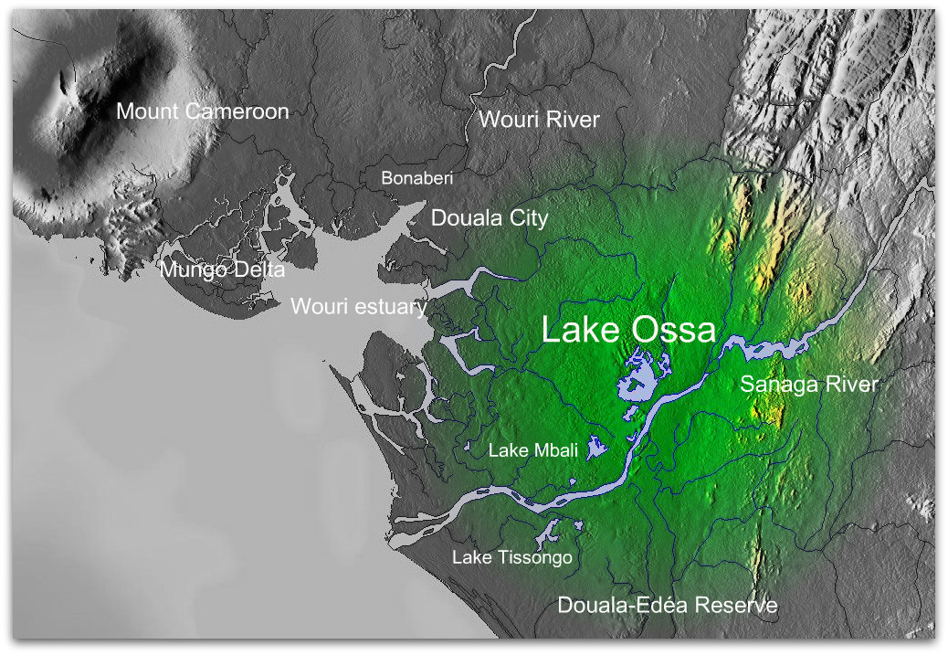 Lac Ossa